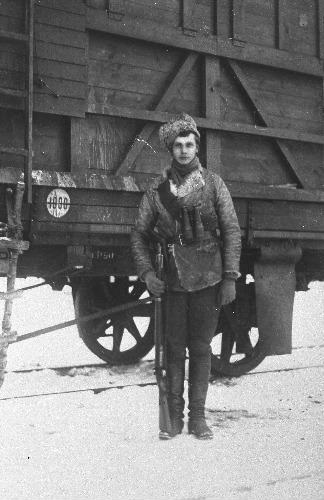 Soomusrongi nr 2 ülem kapten Jaan Lepp Vabadussõja ajal veebruaris 1919. Karl Hugo Akeli (1878-1942) foto.